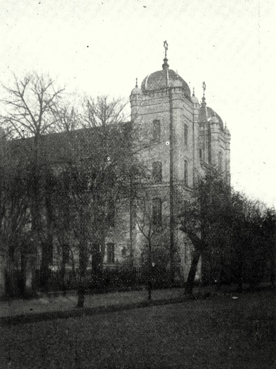 Bożnica gnieźnieńska/Synagogue in Gniezno